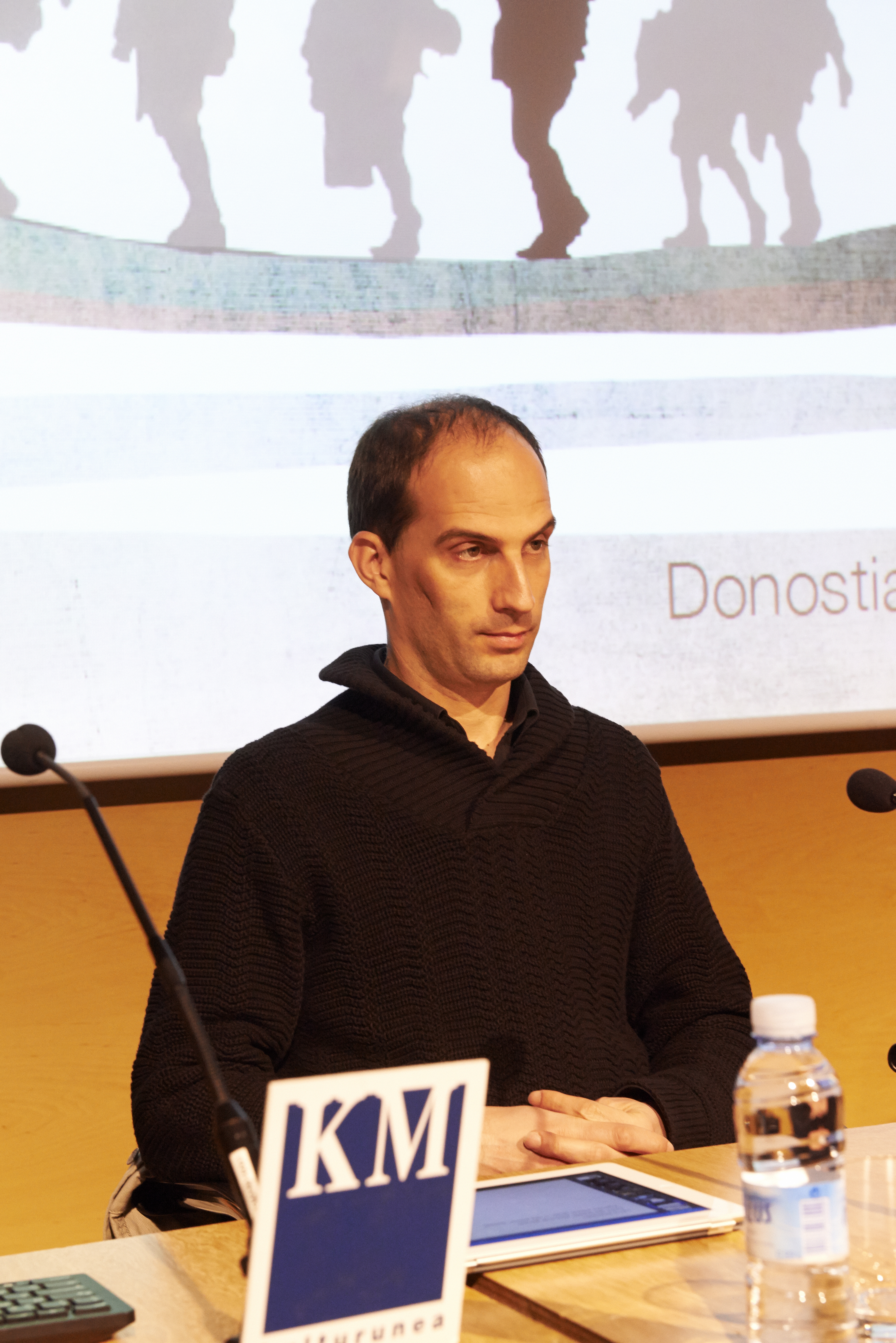 Eneko Bidegain KOLDO MITXELENA Kulturunean